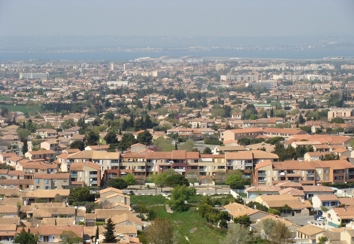 Gignac-la-Nerthe (quartier de Laure), Marignane et l'étang de Berre, vus de la colline de Saint-Michel de Gignac.